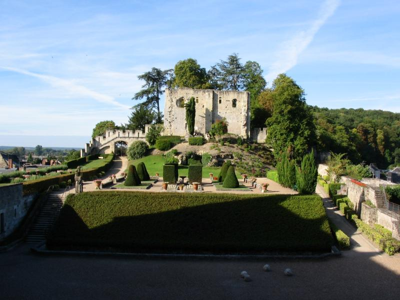 FoulquesNerra 's Fortress in Langeais